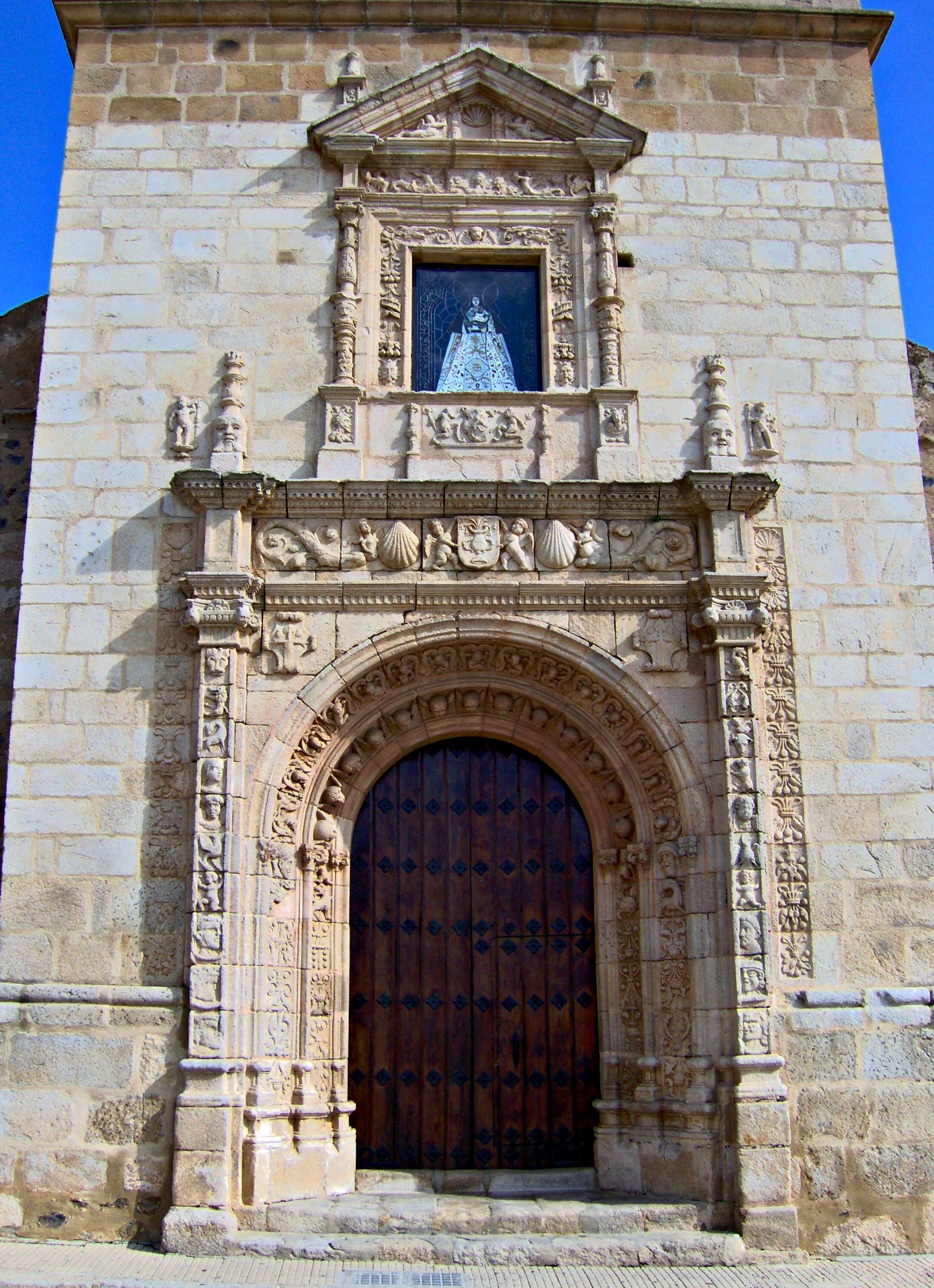 Fotografía de la portada plateresca de la iglesia parroquial de La Garrovilla